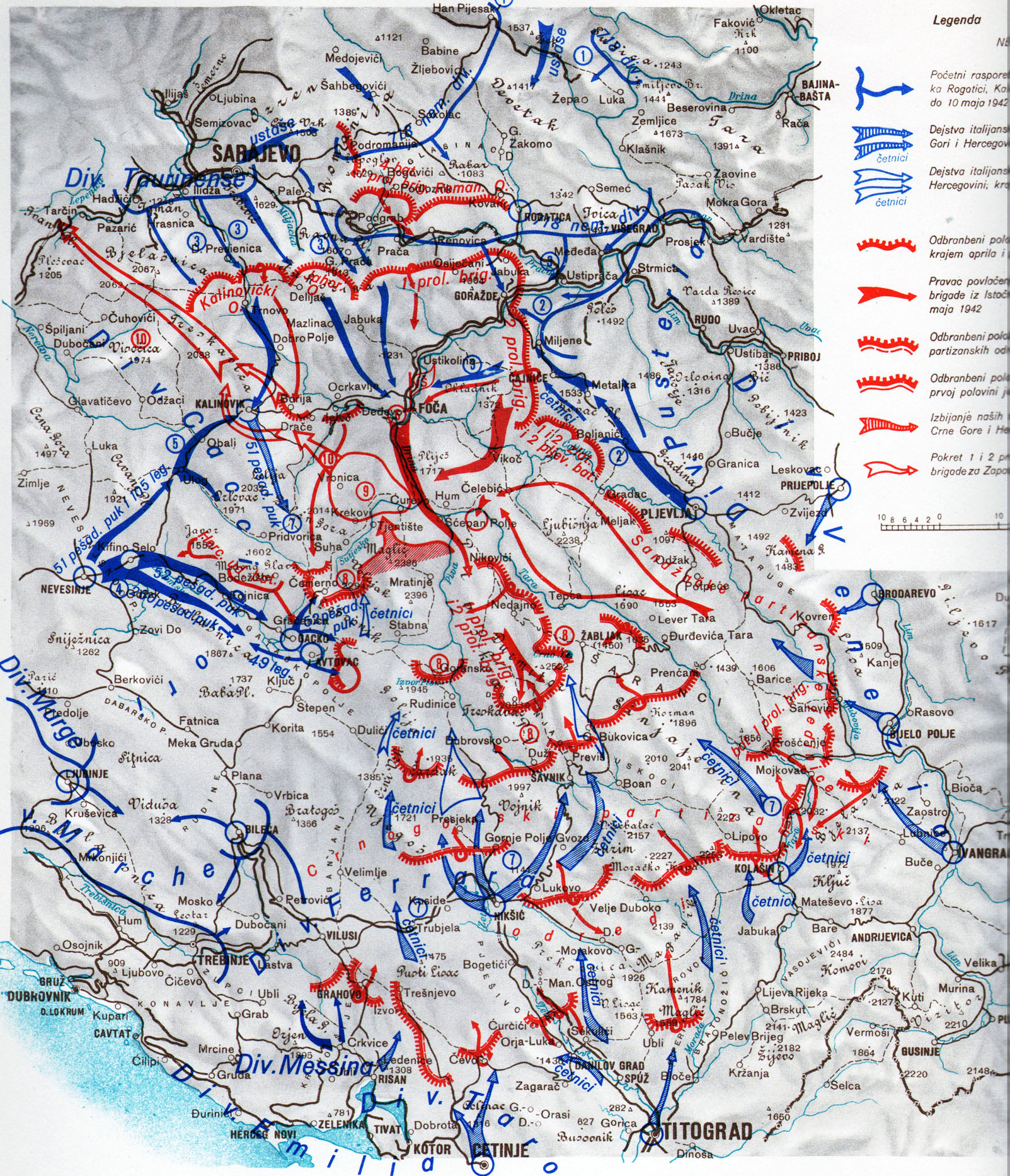 Srpskohrvatski / српскохрватски: Neprijateljska ofanziva u istočnoj bosni, crnoj gori i hercegovini (od 20 aprila do sredine juna 1942 godine).